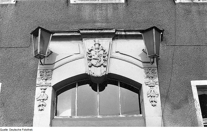 Original image description from the Deutsche FotothekTriebischtal-Tanneberg. Portal am Schloß